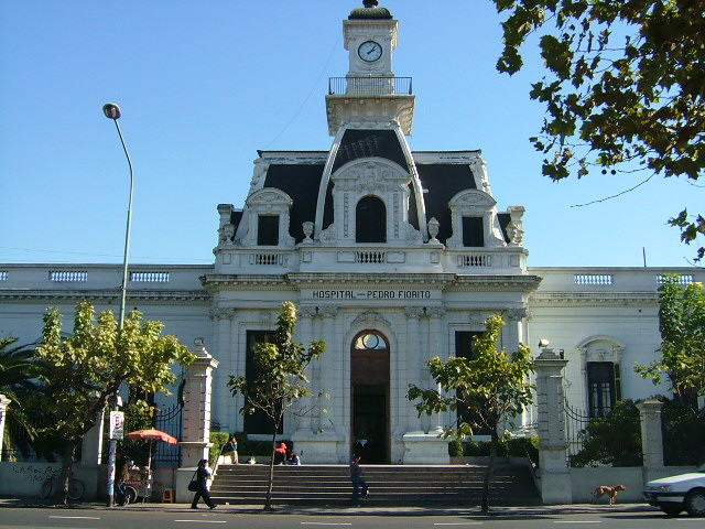 Hospital Pedro Fiorito (Avellaneda, Argentina)